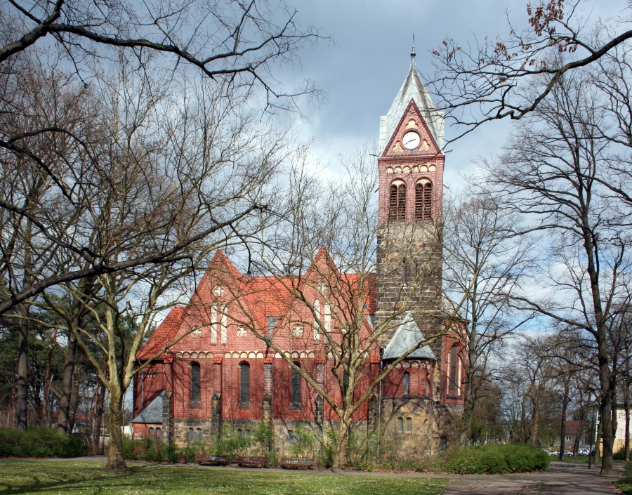 Friedenskirche Grünau ( Ansicht aus SW )